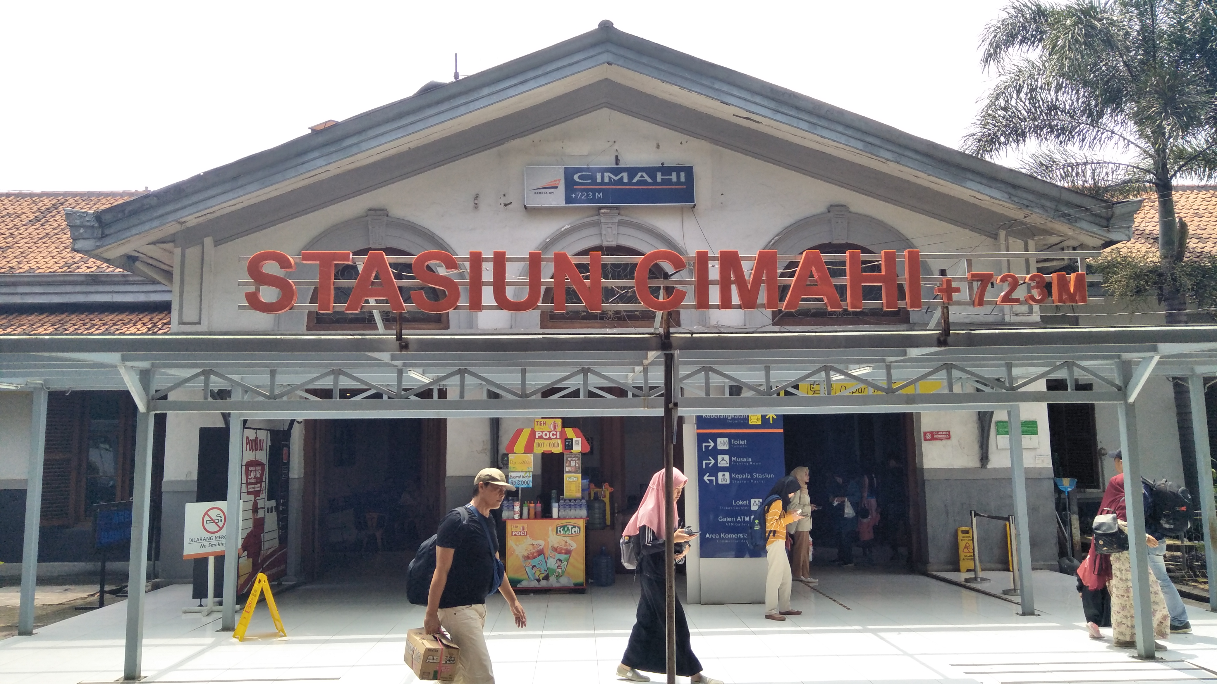 Stasiun Cimahi